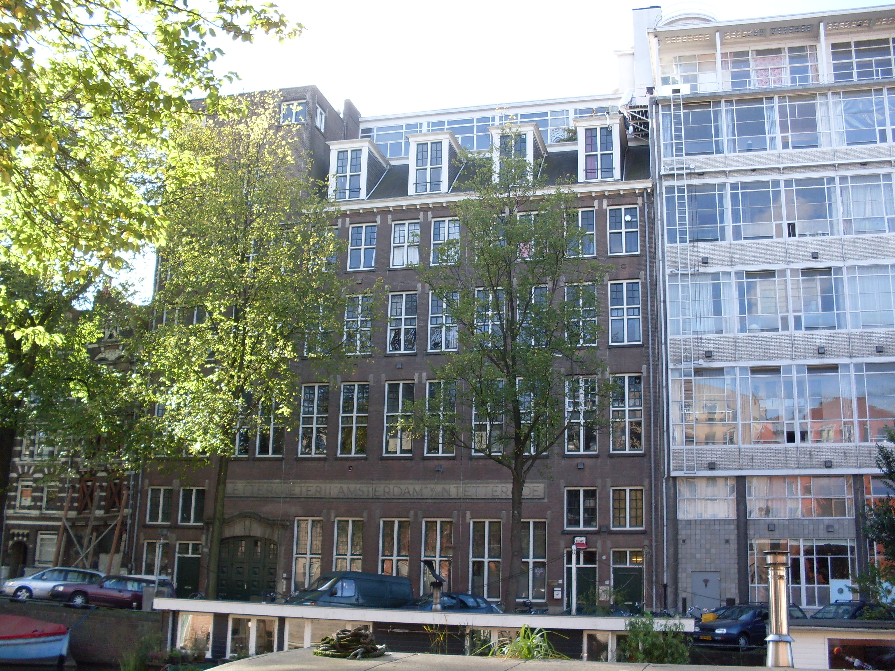 Lettergieterij Tetterode, Da Costakade 160, Amsterdam West.